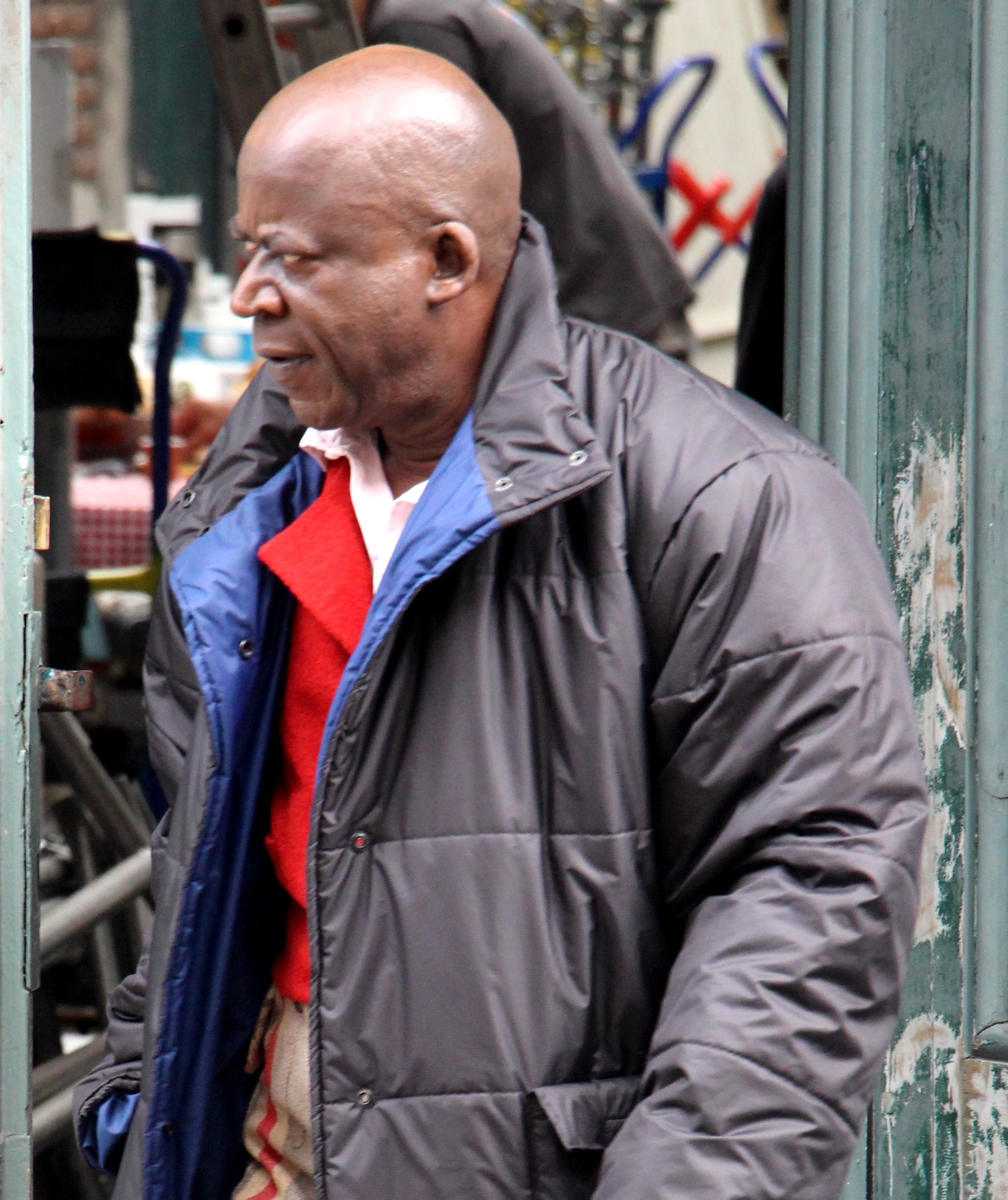 Pascal Nzonzi sur le tournage du film Les Visiteurs 3 : La Terreur, en juin 2015, à Namur.